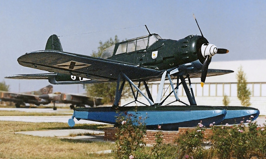 Arado AR196 Seeaufklärer in der Ausstellung des bulgarischen Luftwaffen-Museums auf dem Flughafen in Plovdiv. Zuvor wurde dieses Seeflugzeug im Marinemusuem in Varna ausgestellt. Aus Platzmangel dann aber in das Luftwaffenmuseum umgesetzt.